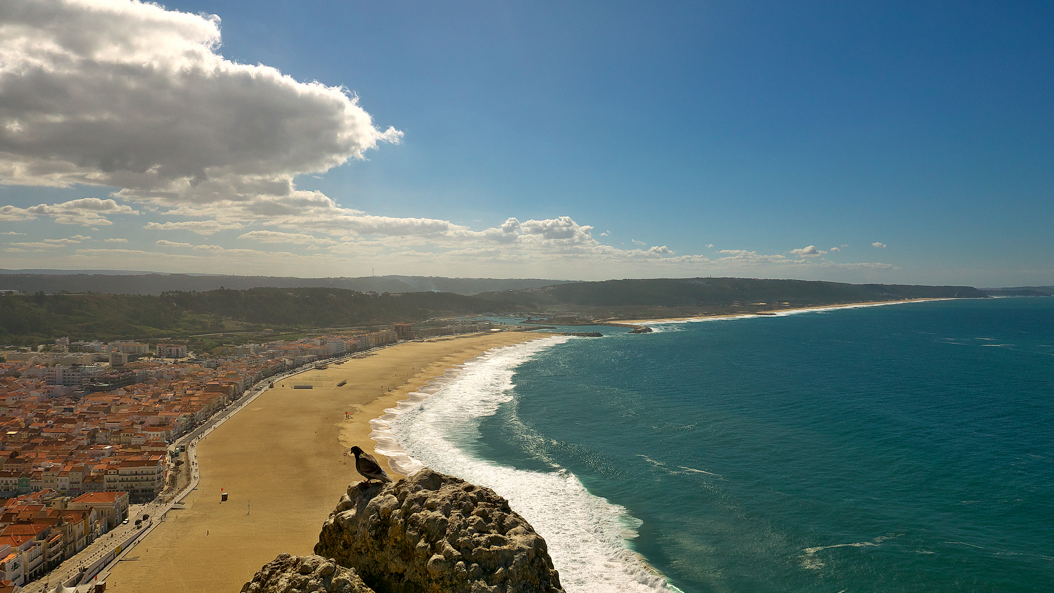 Vista sobre la playa de Nazaré